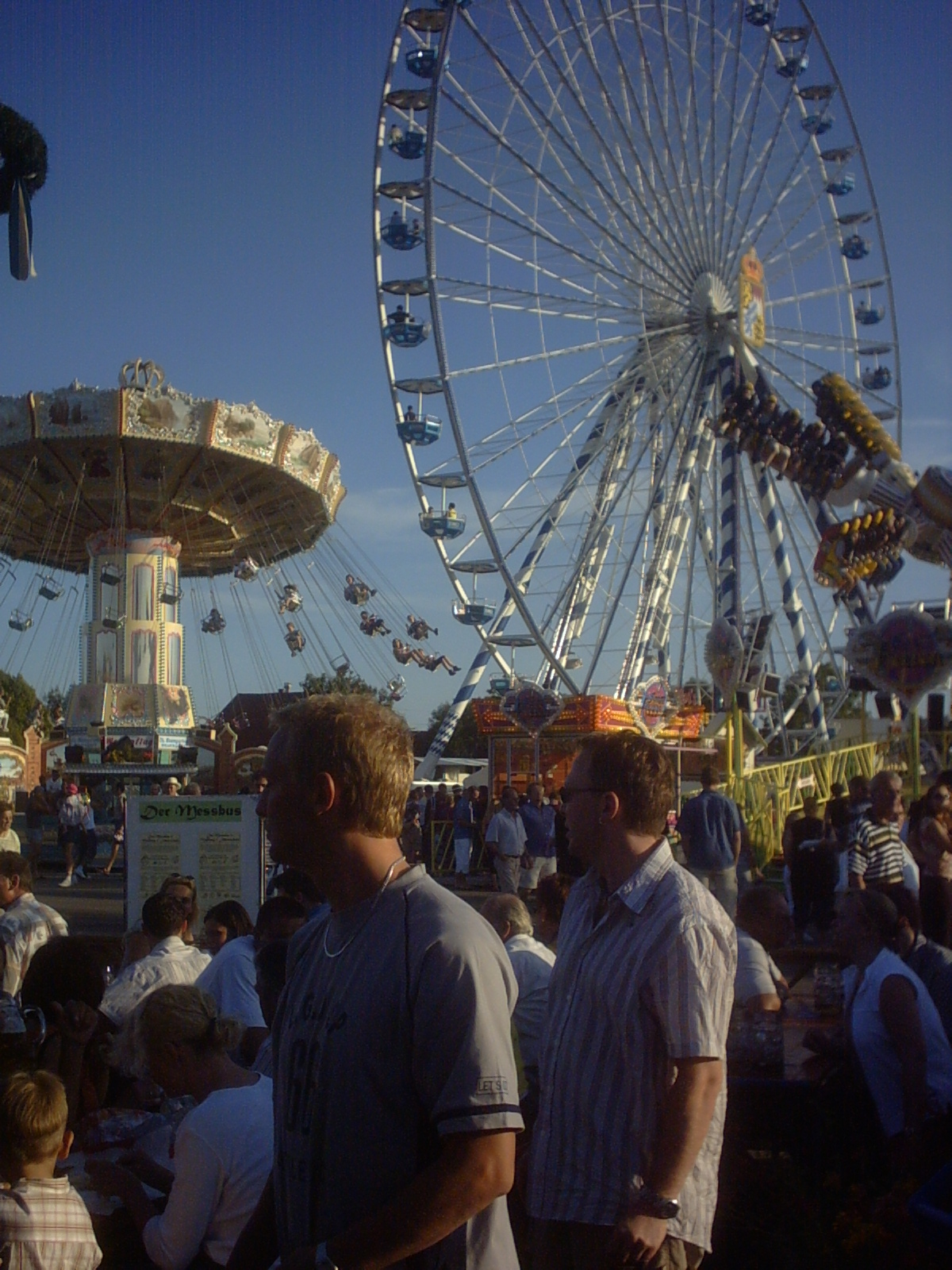 Pfingstmesse Volksfest Nördlingen Germany